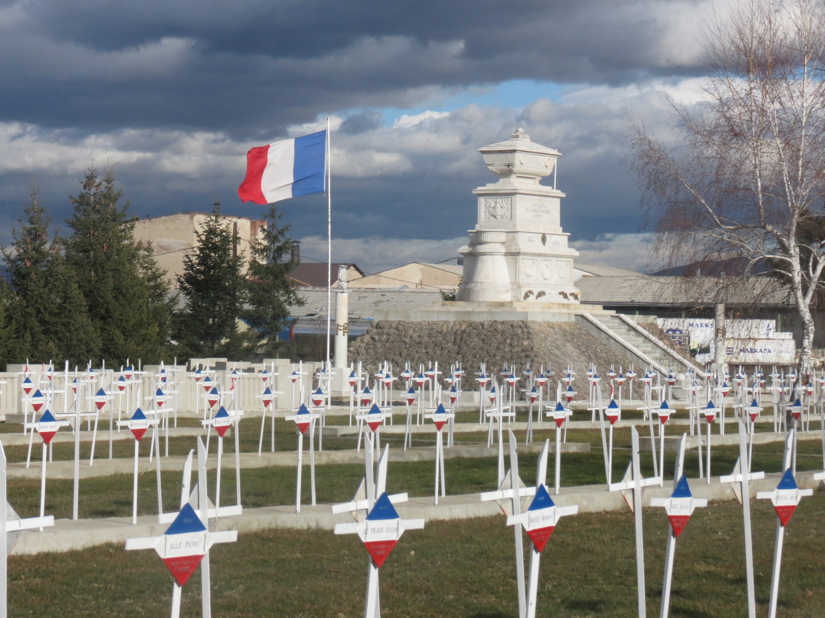 Cimetière militaire français de Bitola